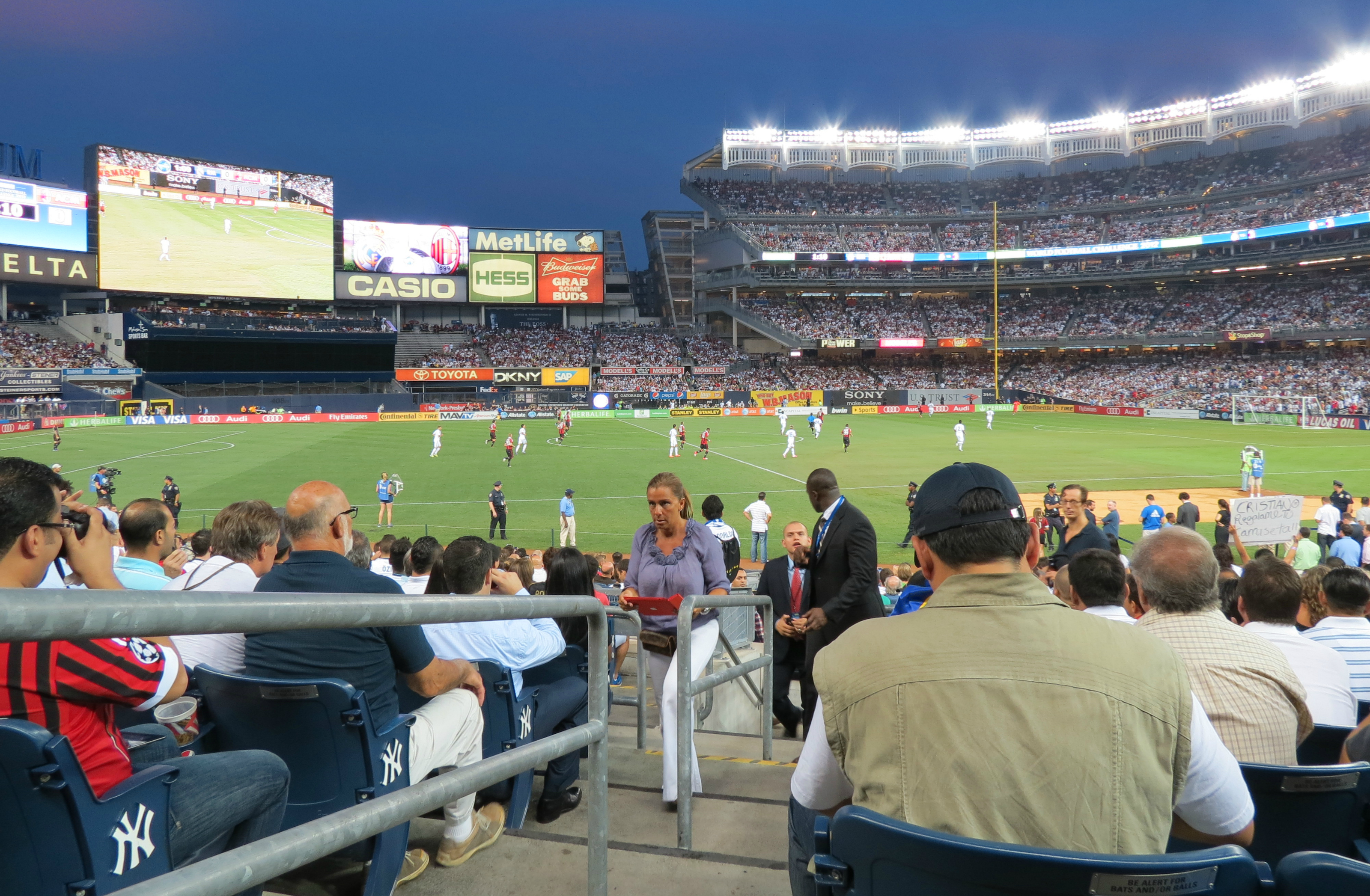 Real Madrid vs AC Milan, August 2012 at Yankee STadium.